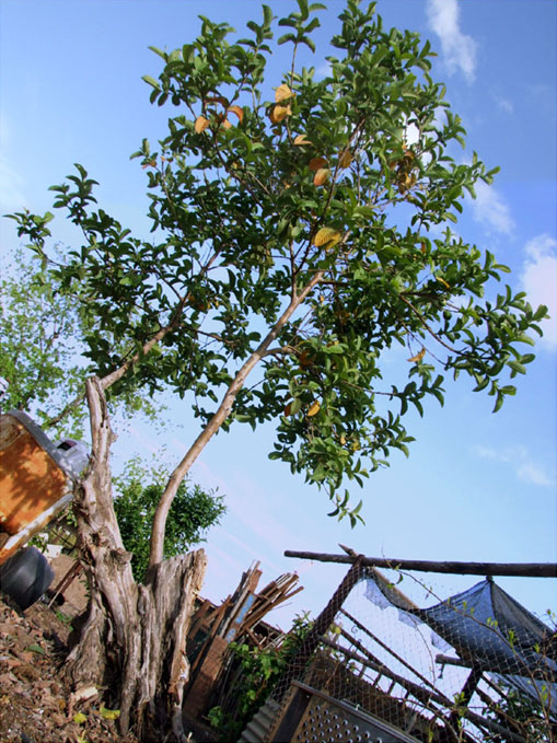 Apple guava, Common guava (Psidium guajava), Goiabeira, Goiaba